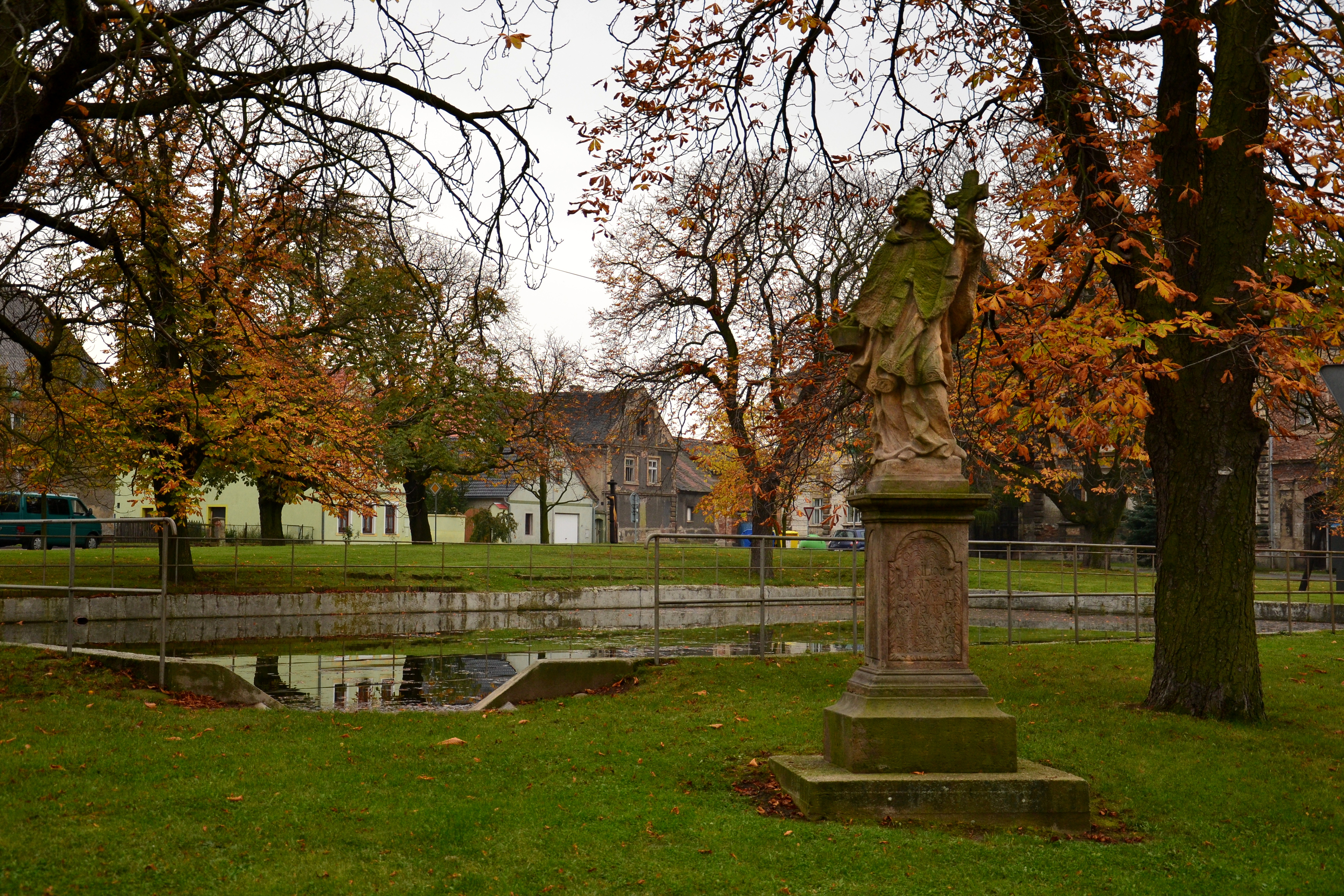 Socha svatého Jana Nepomuckého, transfer z Kyjic, Vrskmaň.